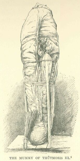 Zeichnung der Mumie des Thutmosis III. von Faucher-Goudin nach einem Foto von Emil Brugsch, der die Mumie 1882 in der Cachette von Deir el-Bahari barg.